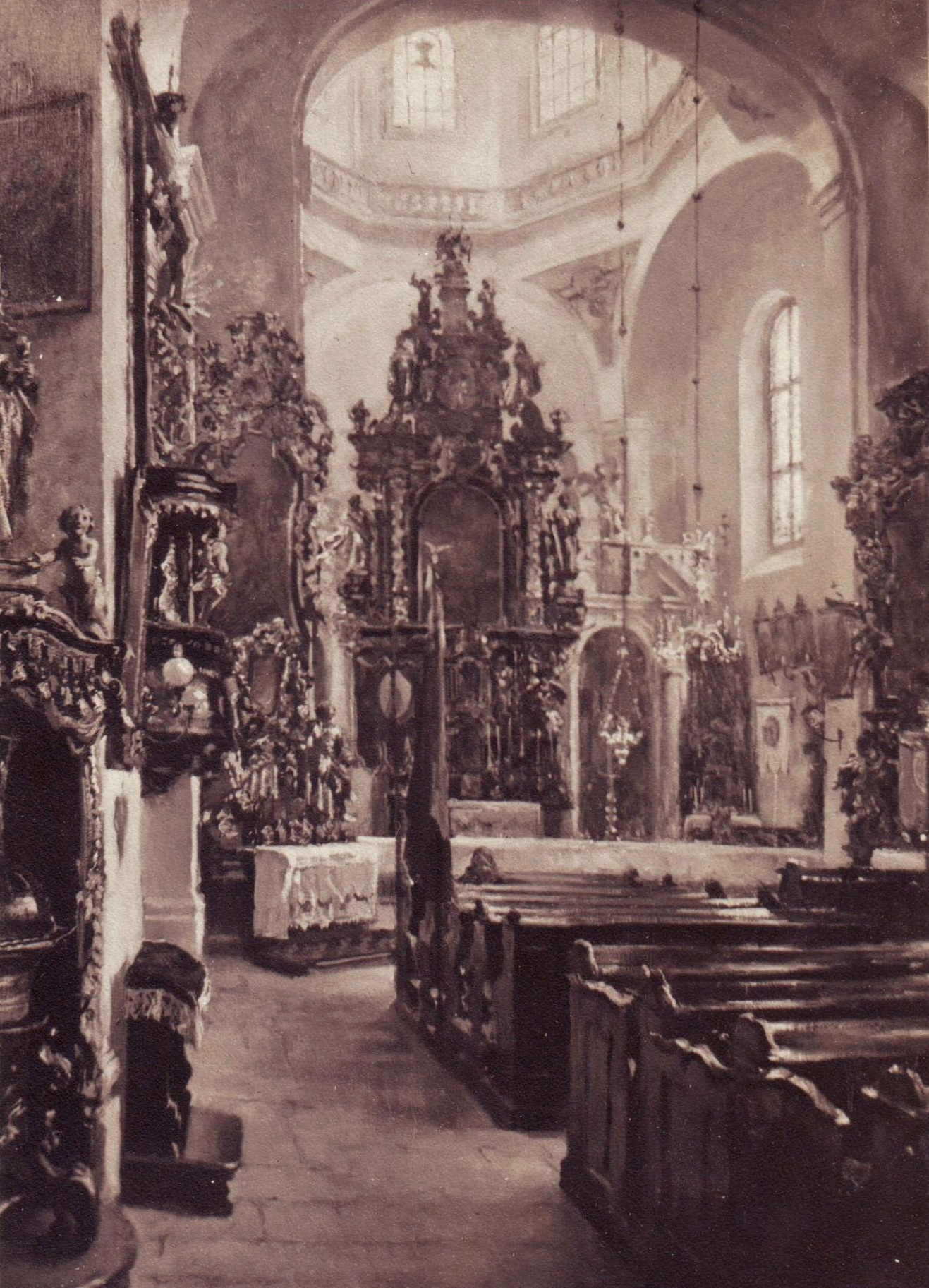 Fotografie obrazu .A.Jelínka s názvem "Interiér kostela v Havlíčkově Brodě"